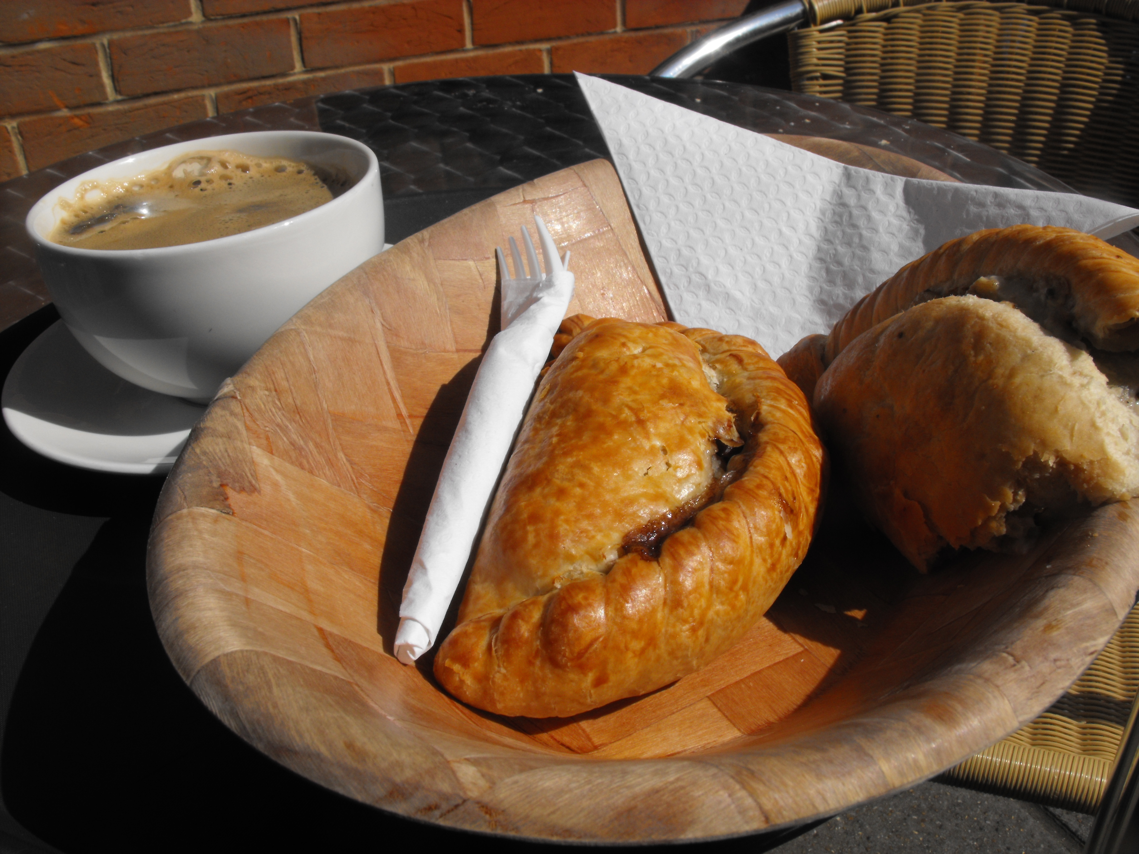 Pierogi korkwalijskiearelskie